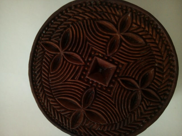 Слово за гурабије